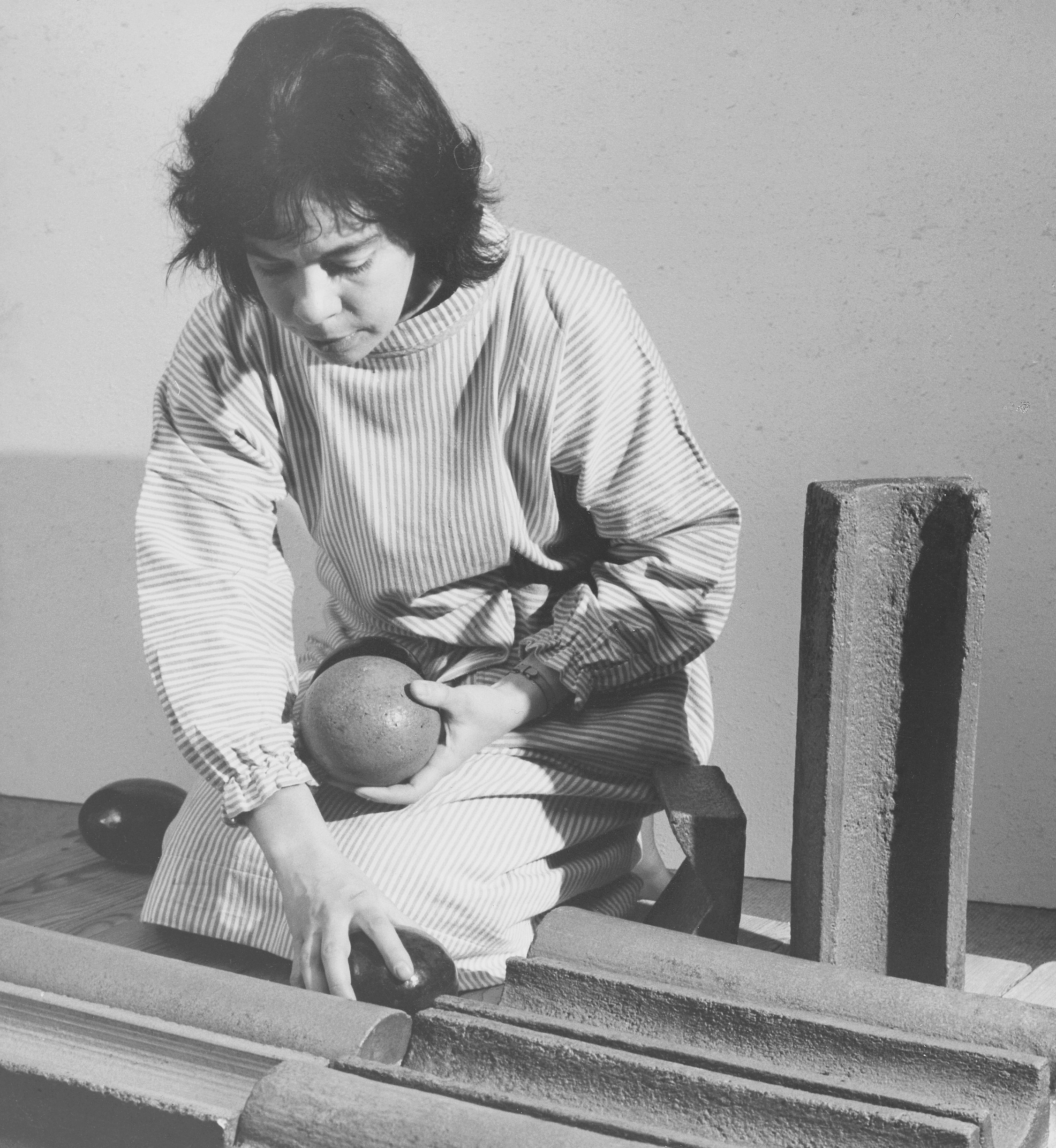 Karin Björquist formger keramikdelar för väggarna i Mälarhöjdens tunnelbanan